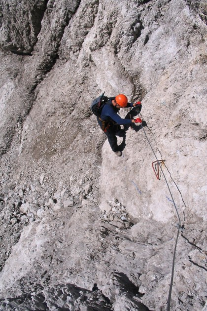 Ari Schübel Steig, Große Sandspitze